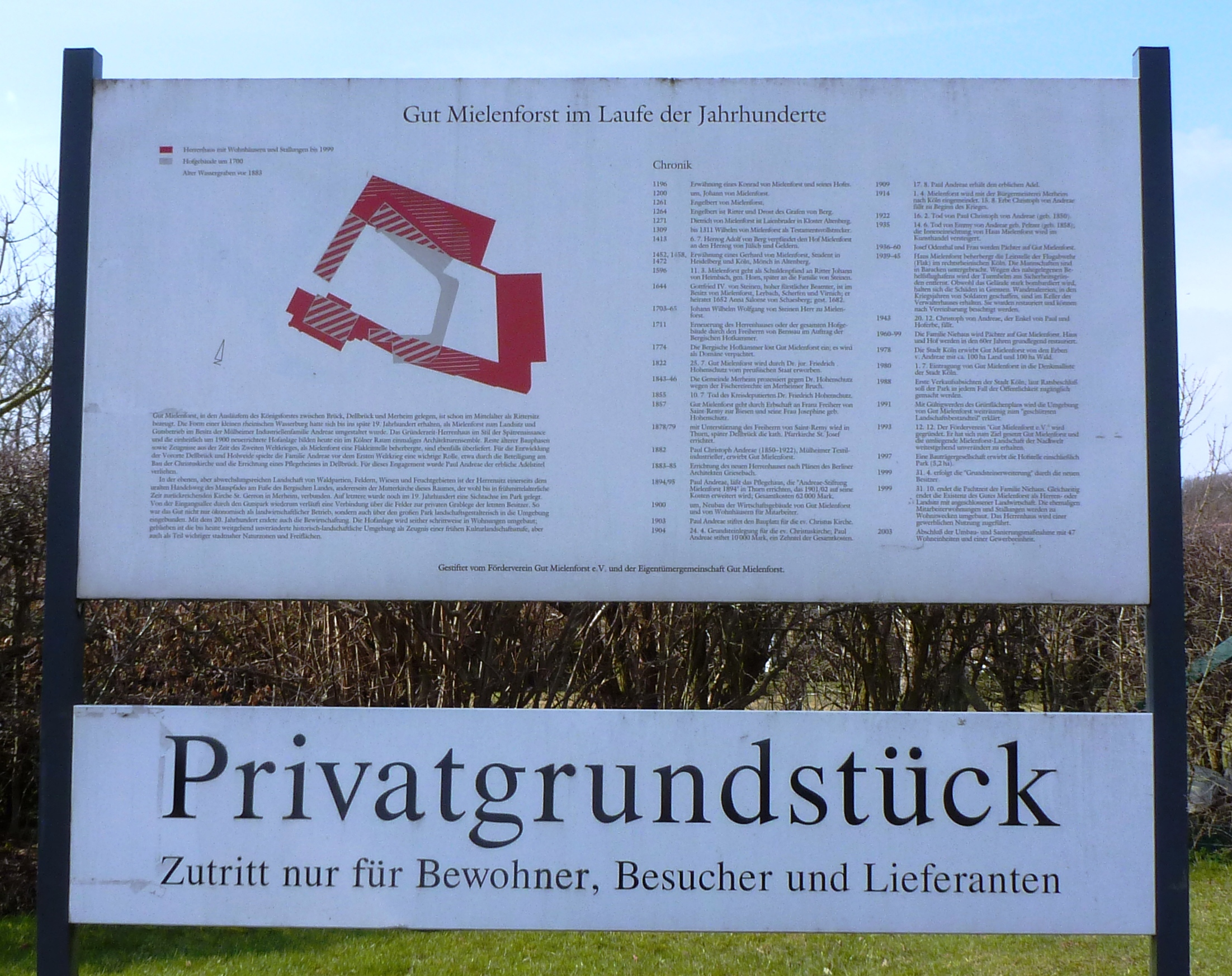 Gut Mielenforst in Köln-Dellbrück, Schild am Eingang